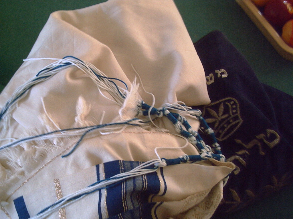 Tzitzit